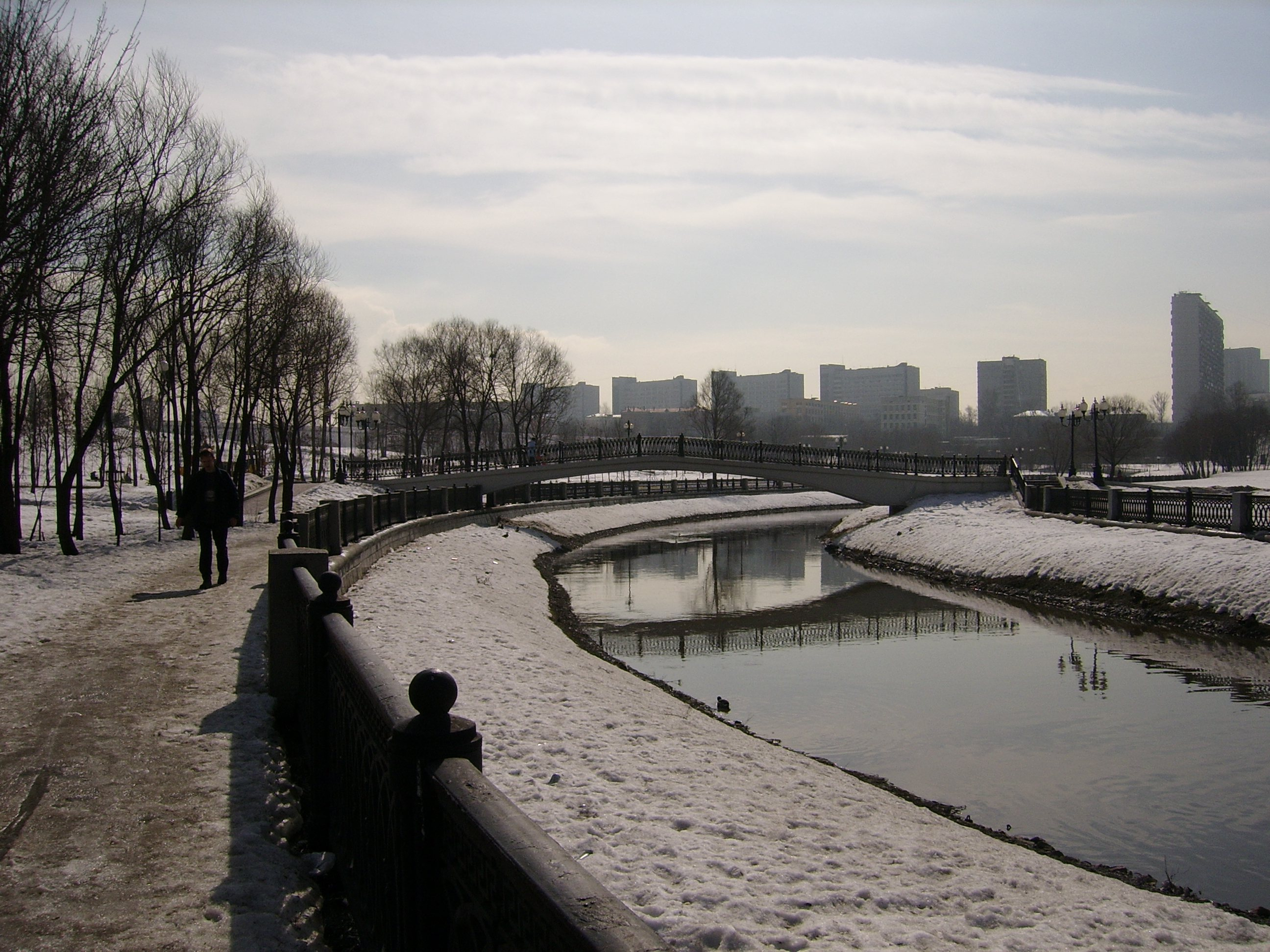 Река Яуза в Москве